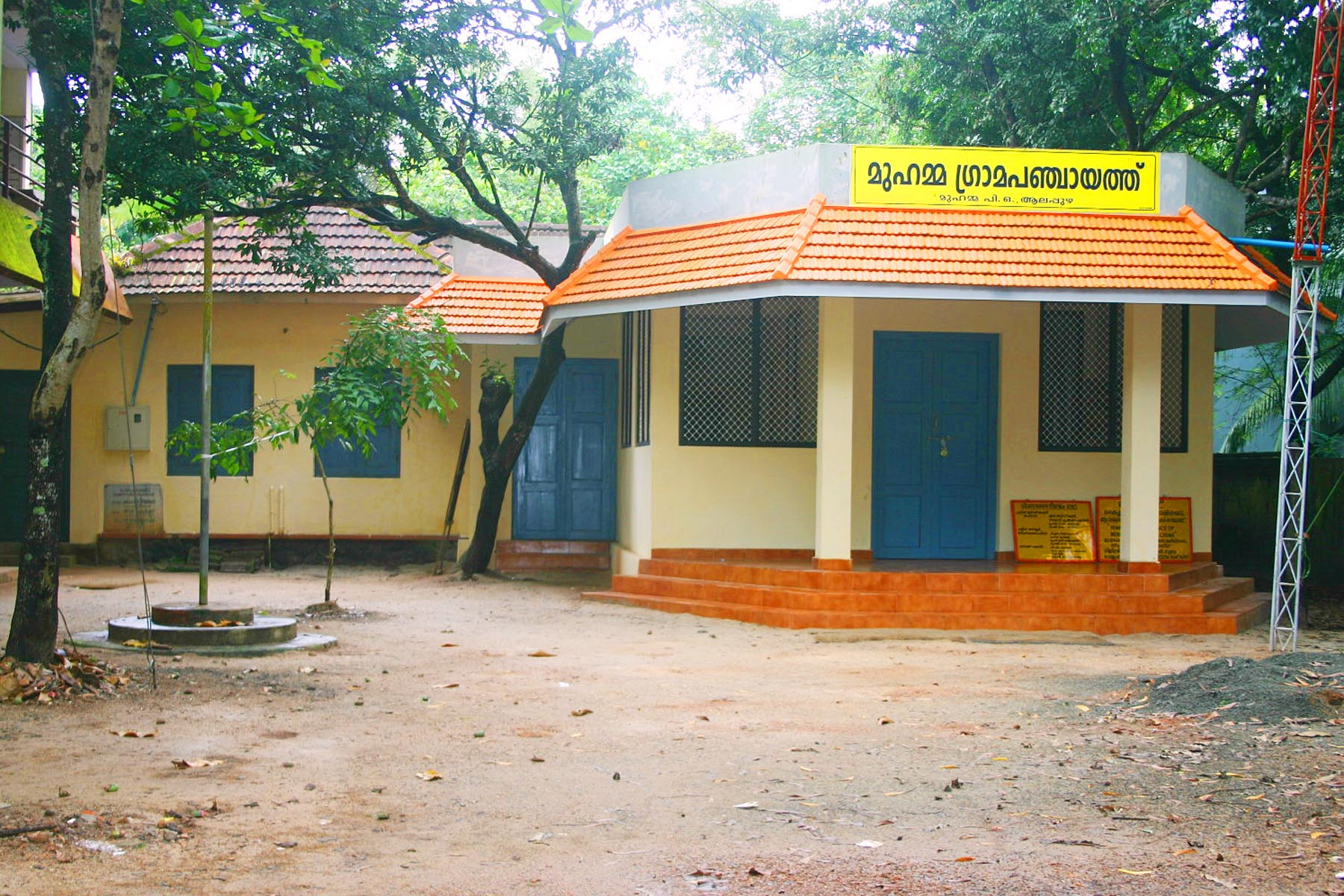 മുഹമ്മഗ്രാമപഞ്ചായത്ത് കാര്യാലയം